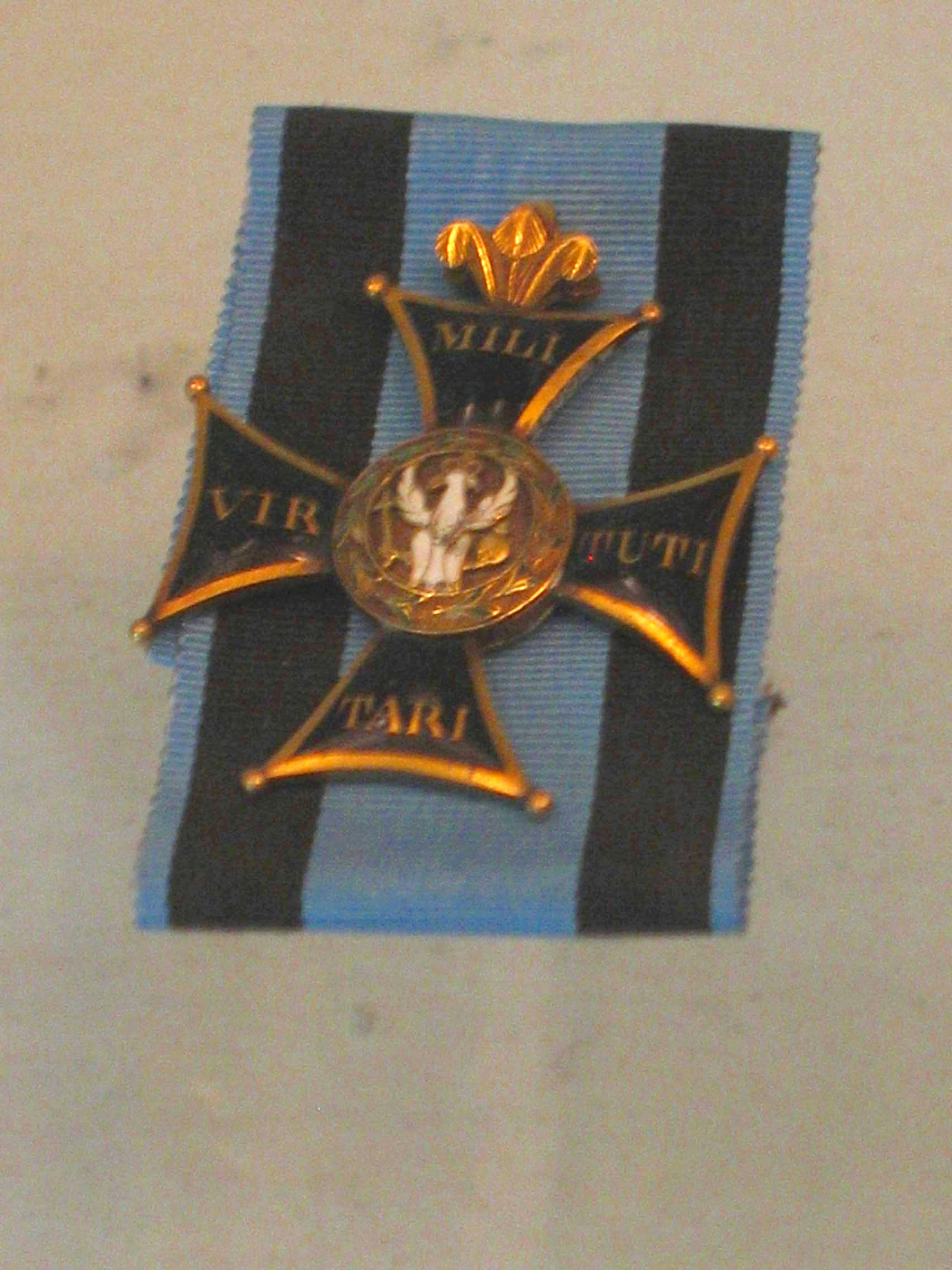 Krzyż Komandorski Orderu Virtuti Militari Jana Henryka Dąbrowskiego z 1808 author User:Mathiasrex Maciej Szczepańczyk